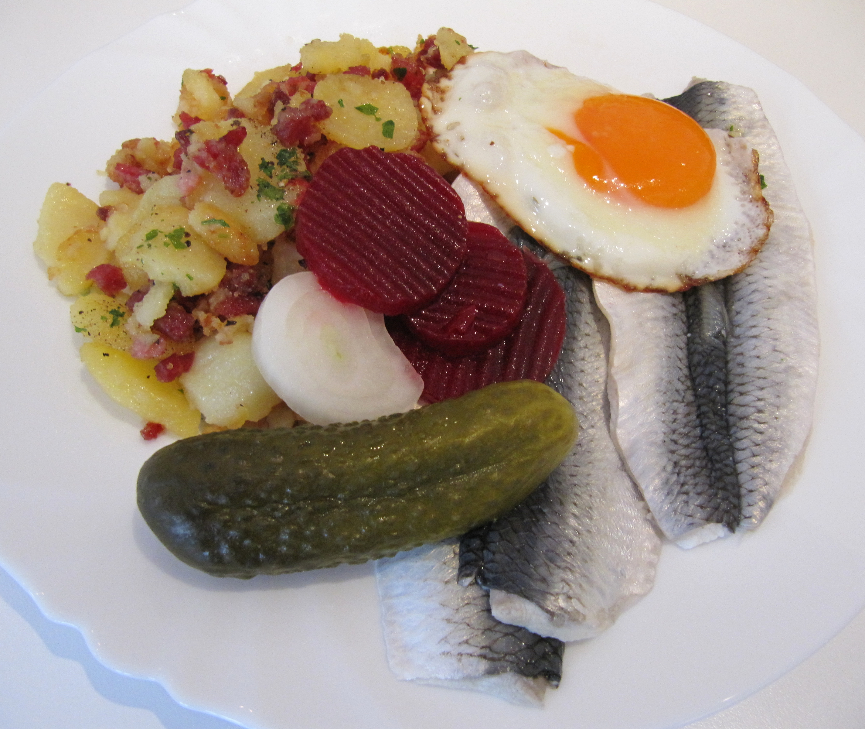 GT_Hering-Spiegelei.Bratkartoffeln_1